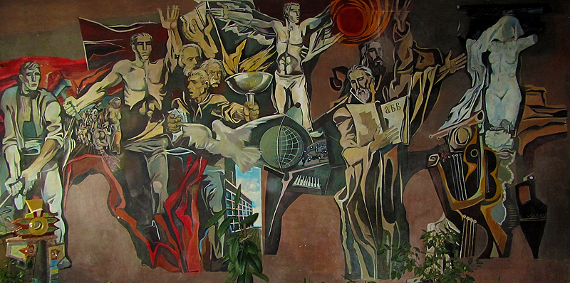 Стенопис на Теофан Сокеров в СОУ "Георги Брегов"